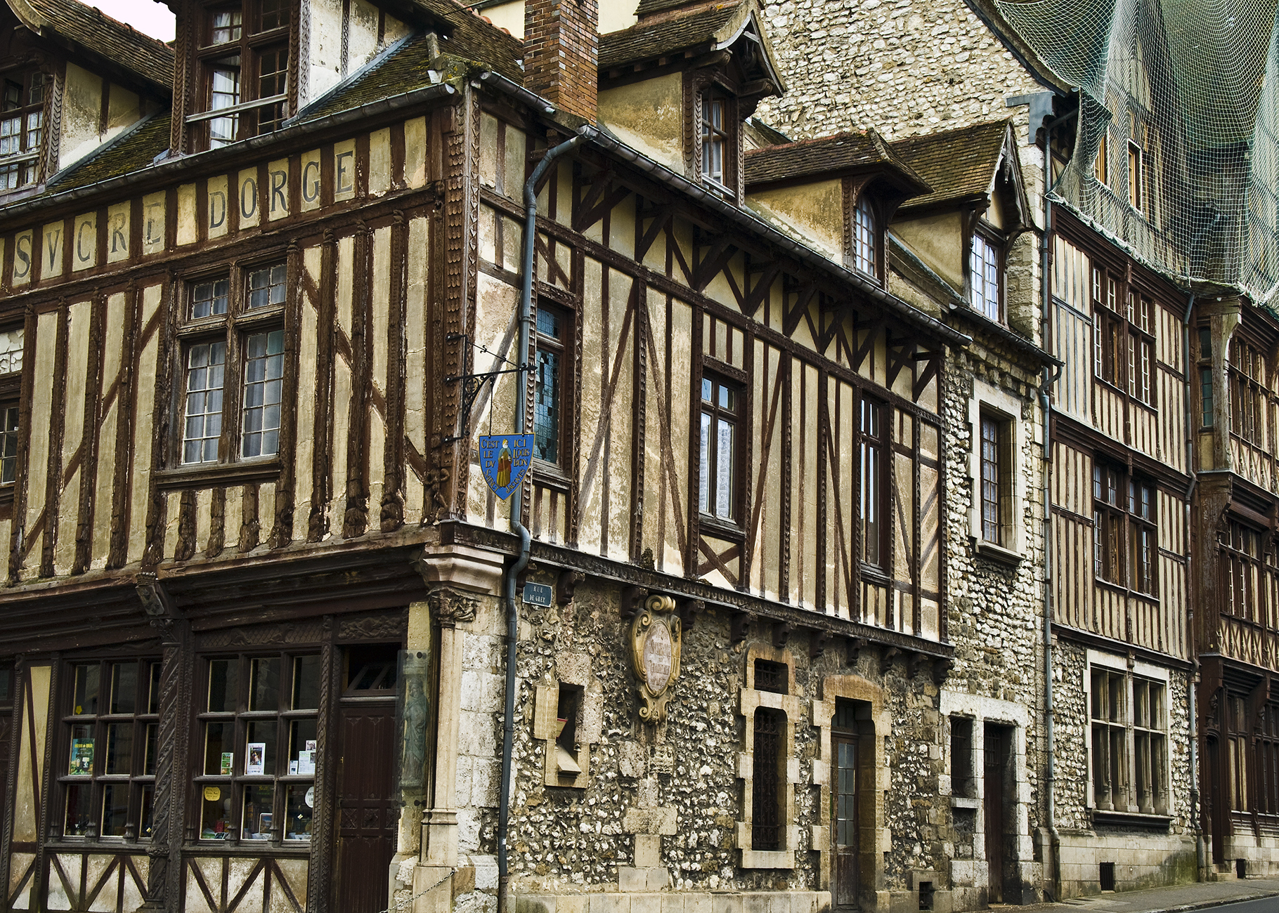 Maison du sucre d'orge, Moret sur Loing, France